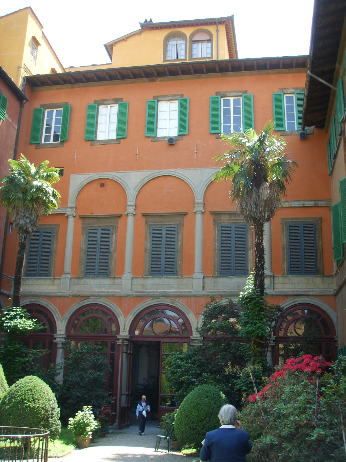 see description